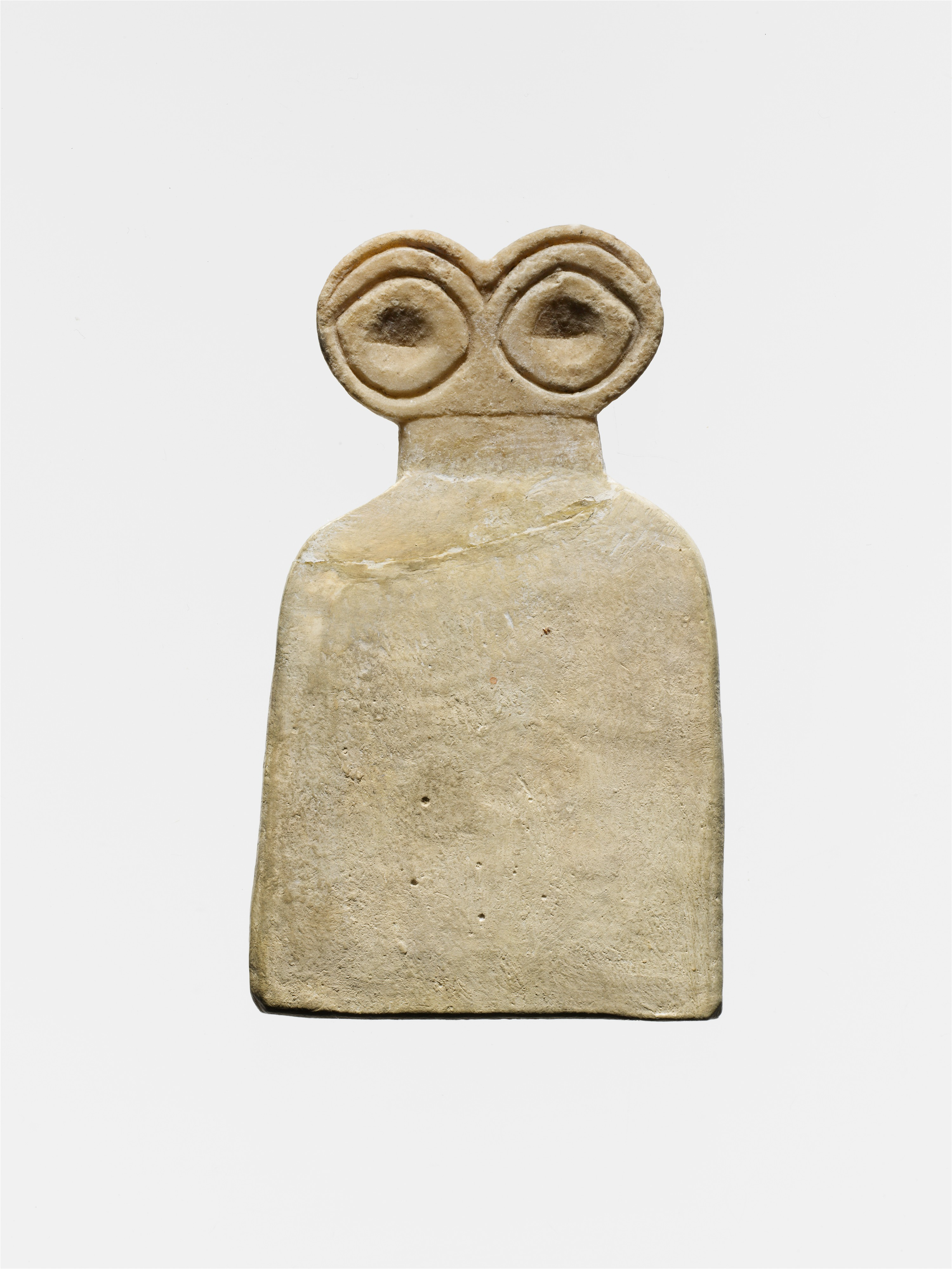 Sculpture; Stone-Sculpture